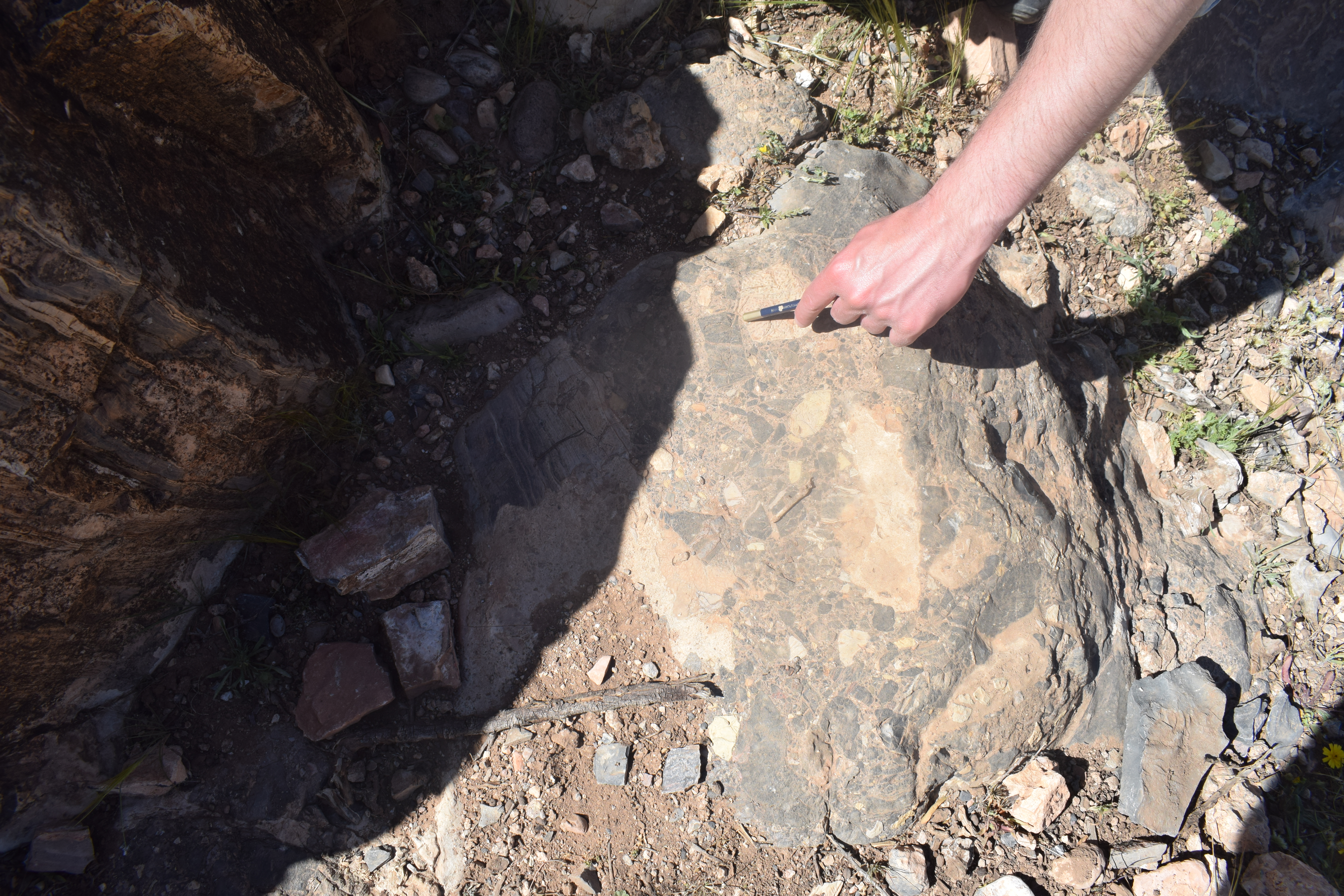 Conglomerat Cambrien de Tioute (Anti-Atlas Marocain) avec morceaux de stromatolites et carbonates Adoudouniens, Coordonnées de l'affleurement: 30.369672° -8.694224°